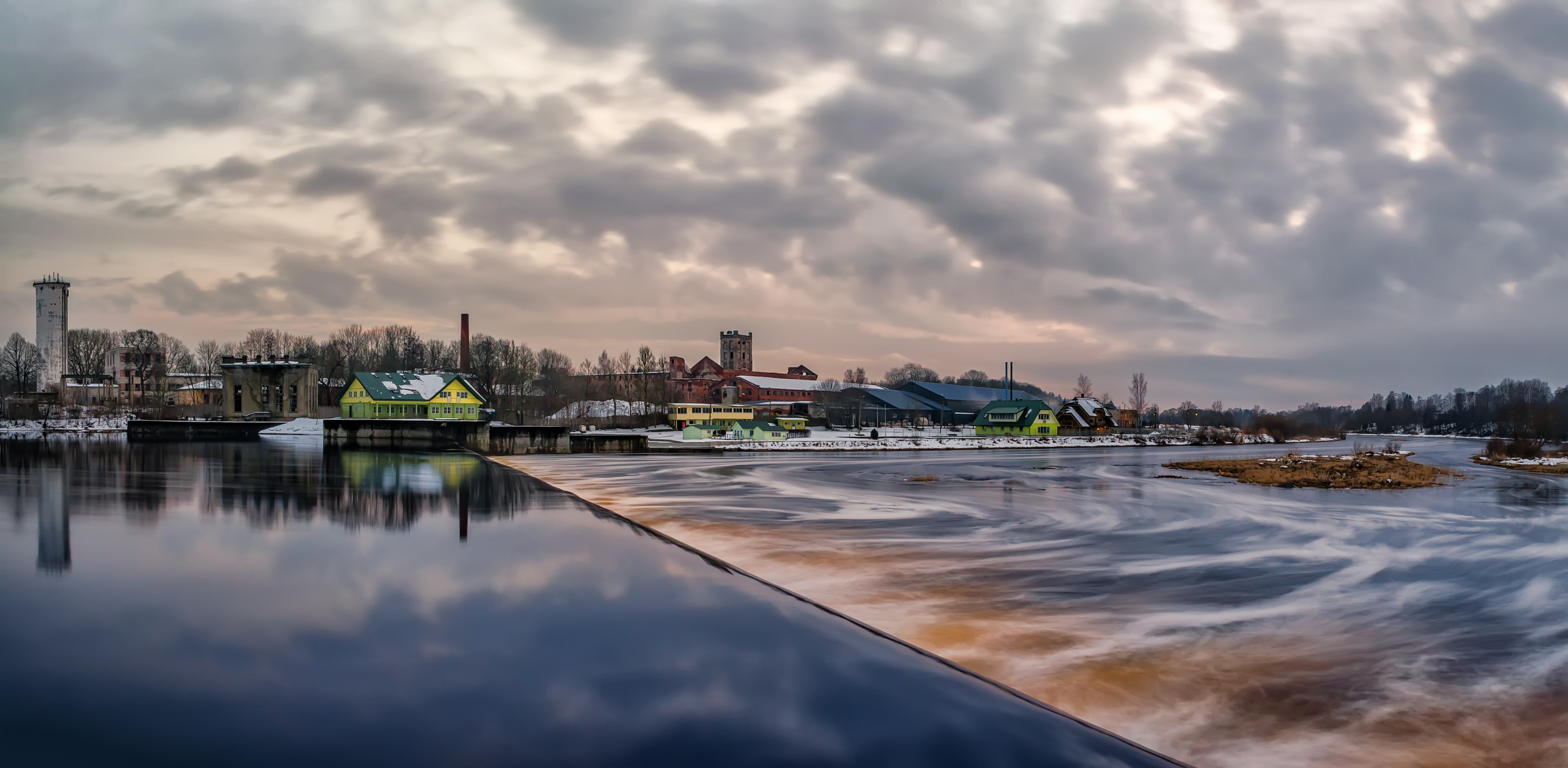 Sindi pais